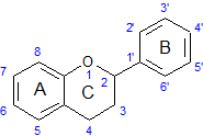 squelette des flavonoïdes numéroté